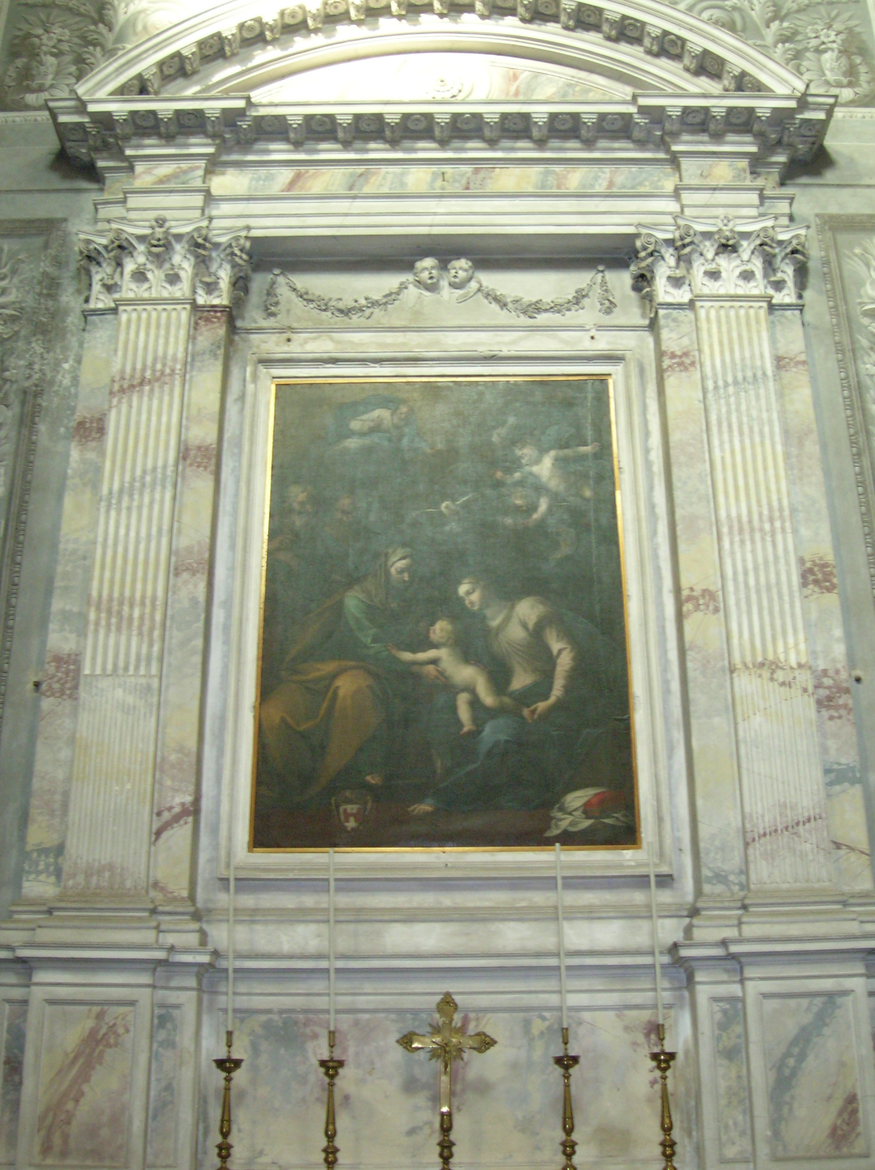 pala raffigurante la Madonna, Sant'Anna e Gesù Bambino, attribuile a Giovanni Stefano Danedi detto il Montalto, nella chiesa del Santo Crocifisso ad Asso